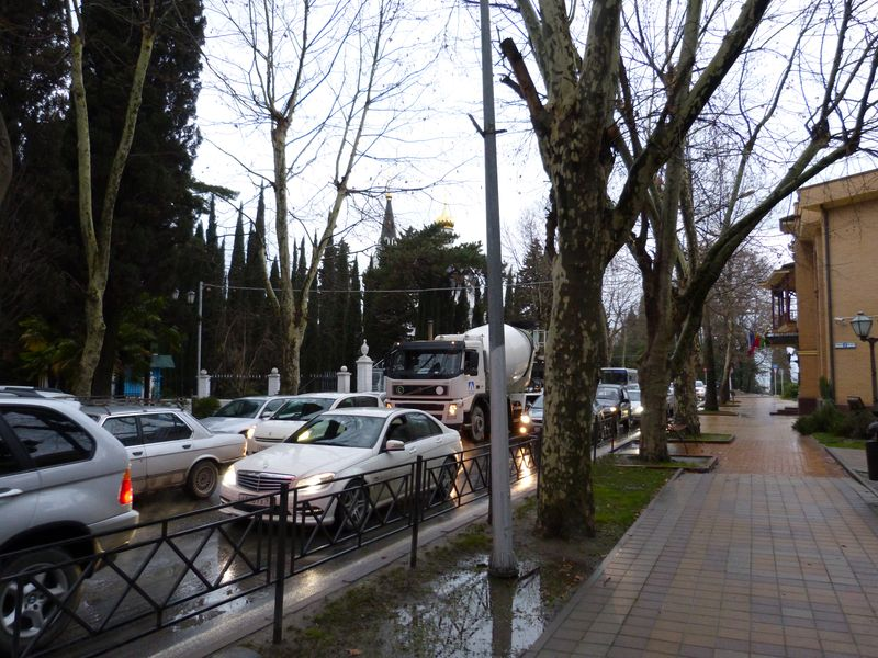 Вход в Собор Архангела Михаила, вид с улицы Орджоникидзе